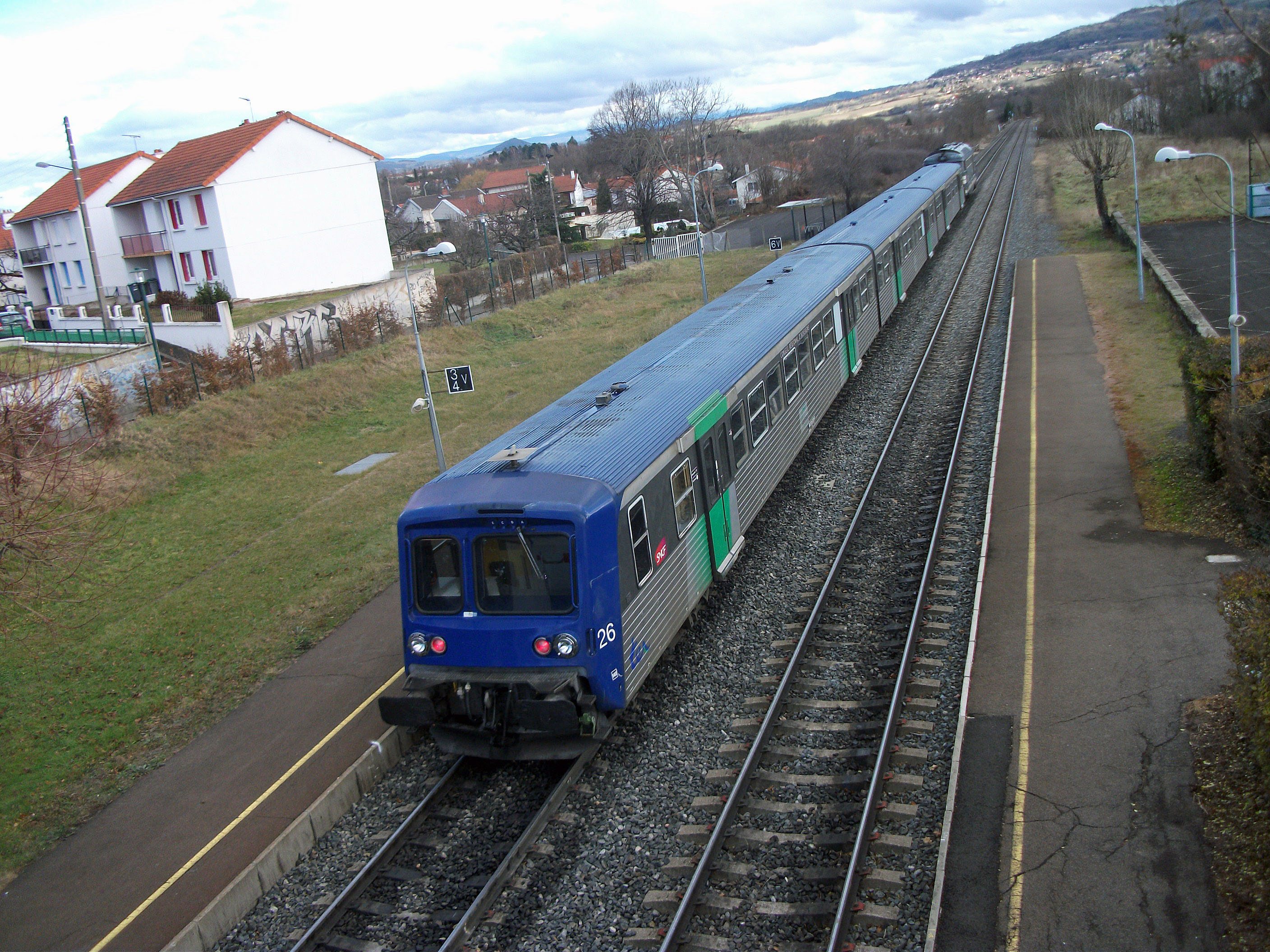 RRR (Rame réversible régionale) 26 sur le TER 873723 (Clermont-Ferrand - Brioude omnibus) le 25 décembre 2013, jour férié.